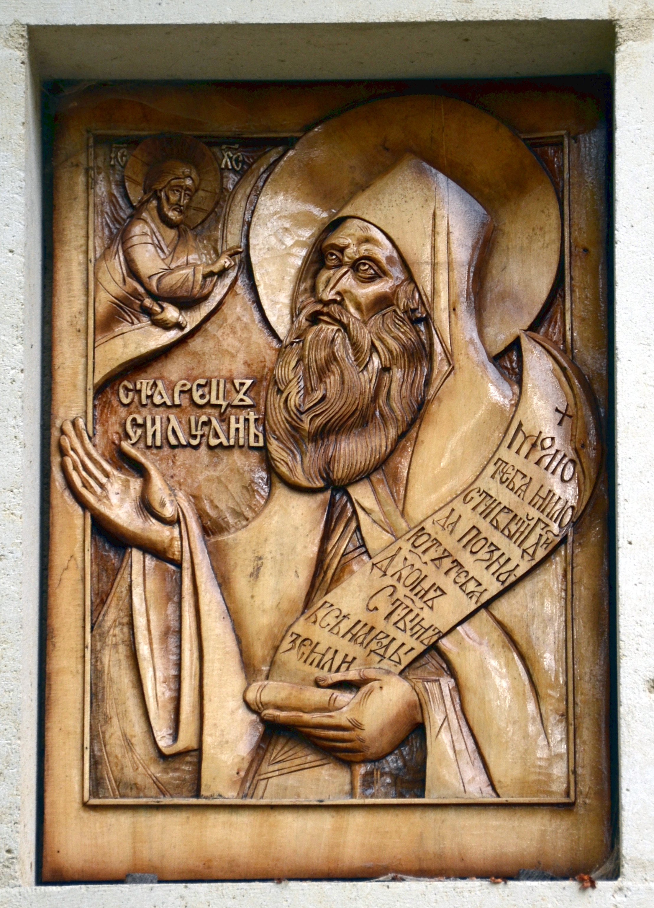 Icône de Saint Silouane à l'entrée du monastère Saint-Silouane.